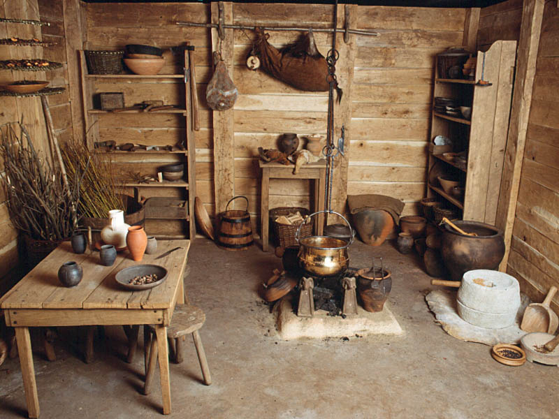 Evocation d'un intérieur domestique. Musée de Bibracte, Bourgogne.